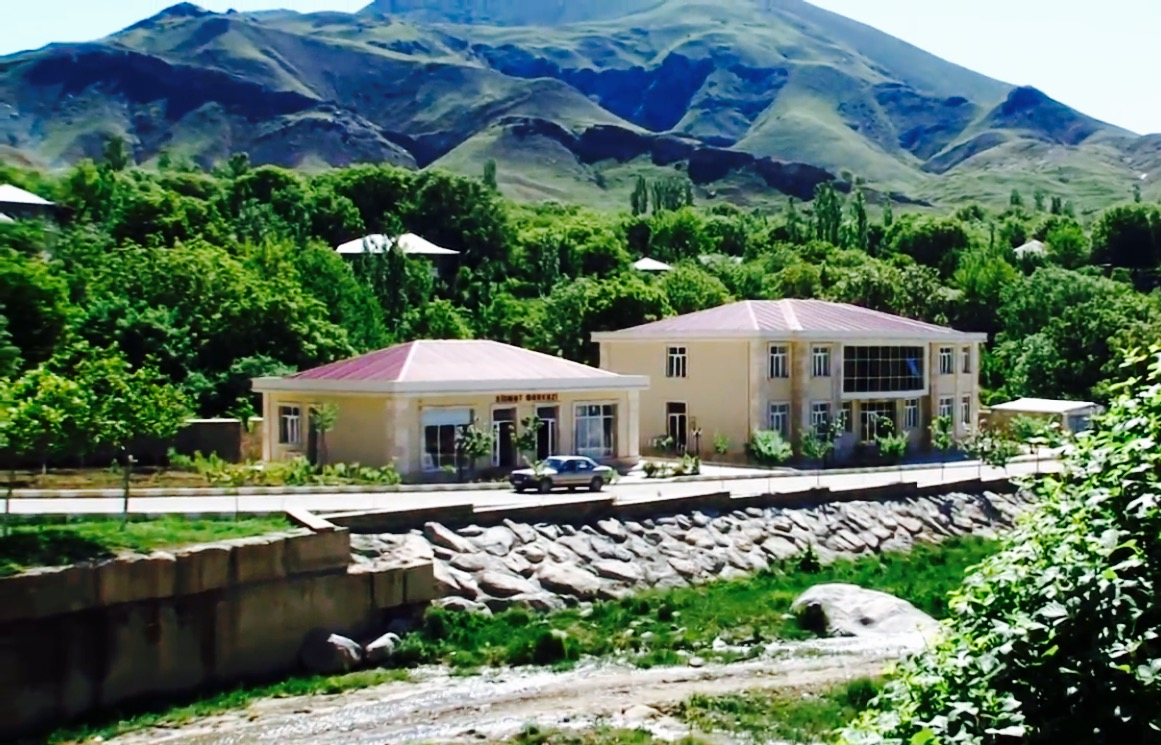 Xanəgah kəndi